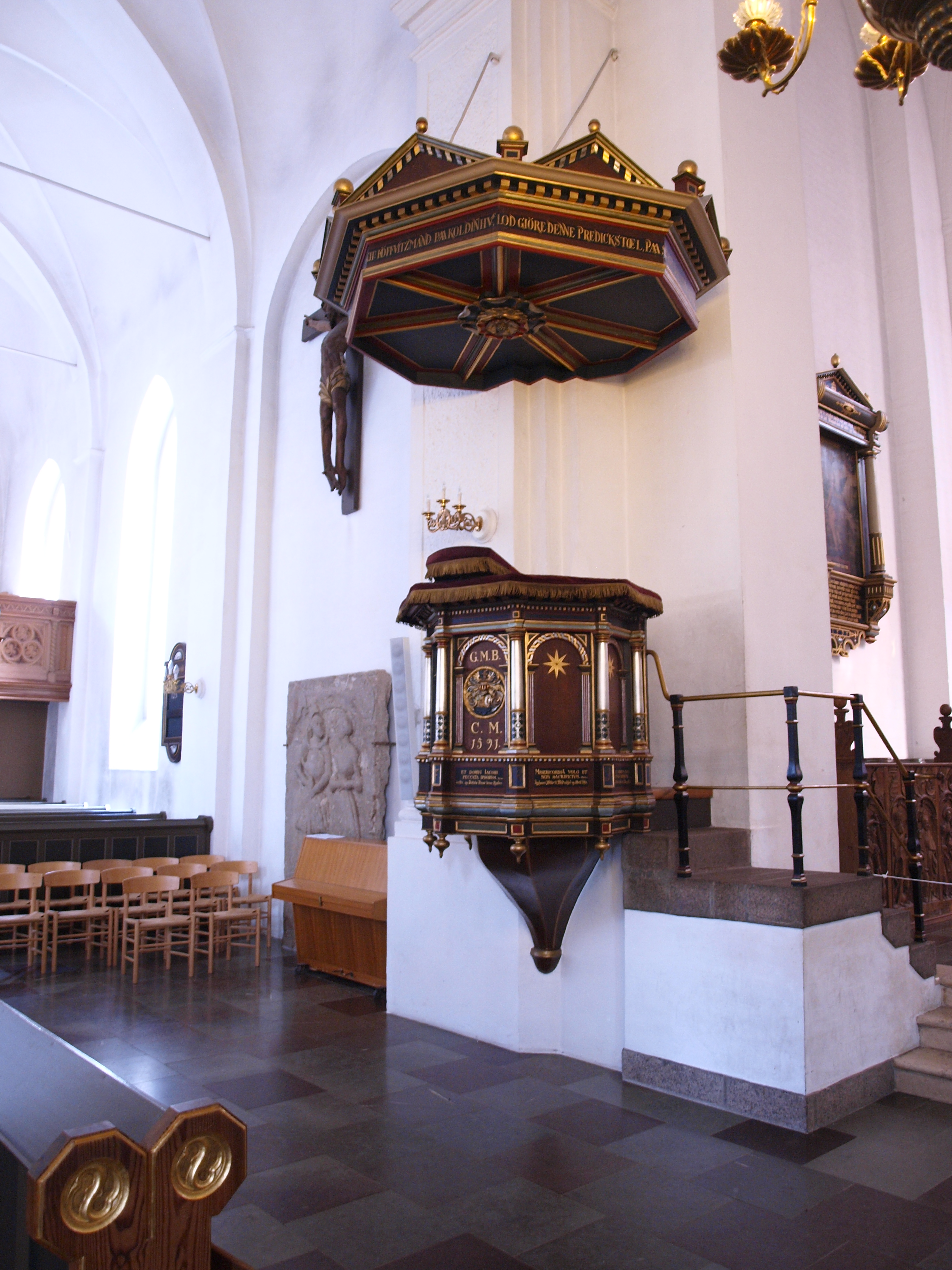 Prædikestole, Sankt Nikolai Kirke (Kolding), sænket kirken i 1591 af lensmand på Koldinghus, Caspar Markdanner